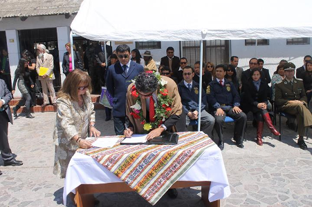 En una emotiva ceremonia, se llevó a cabo el cambio de mando de Gobernadores, en donde la autoridad saliente, Odlanier Véliz Mena, entregó la Gobernación a nuevo gobernador provincial Roberto Lau Suárez. En la actividad participaron autoridades civiles, militares, eclesiásticas y la comunidad, quienes respetando las costumbres ancestrales del pueblo aymara, realizaron la tradicional pawa donde pidieron por la nueva gestión que comienza. En sus palabras de despedida, el ex Gobernador Odlanier Véliz agradeció la oportunidad de haber trabajado por la provincia de Parinacota y manifestó su satisfacción por dejar el cargo con grandes obras realizadas. “La inversión que se izo en esta provincia durante los últimos años es inmensa, más de 63 mil millones de pesos en conectividad, mejoramos carreteras, mejoramos la calidad de vida de quienes hacen patria en esta hermoso lugar. Le deseo la mejor de las suertes a la nueva autoridad porque el trabajo que realice será para cada uno de los parinacotenses”. Por su parte, el nuevo Gobernador, Roberto Lau, en su primer discurso como máxima autoridad provincial, agradeció a la Presidenta Michelle Bachellet por honrarlo con este nombramiento y prometió a la comunidad trabajar codo a codo con ellos, para lograr una política de desarrollo en las comunas de Putre y General Lagos. “Tomo la bandera de Parinacota y trabajaré con esfuerzo, día a día para lograr las grandes iniciativas que tiene el Gobierno al que represento con las comunidades indígenas, soy vuestro servidor y estaré para lo que ustedes me necesiten”, señaló. Posterior a la ceremonia, las autoridades y la comunidad compartieron un vino de honor. (